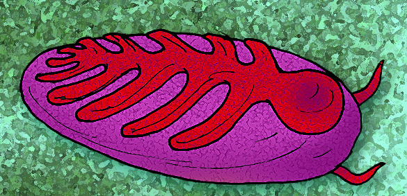 Vendia_rachiata, an Ediacarian type animal.